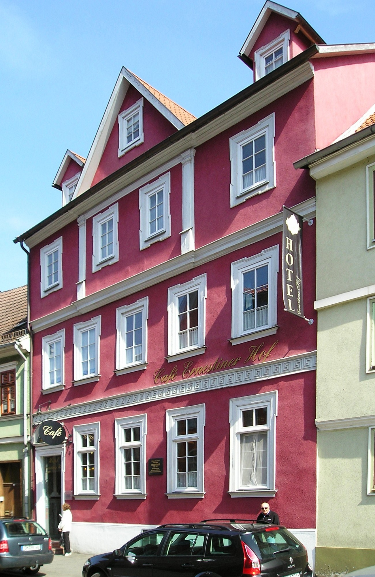 Ernestiner Hof in Meiningen, traditionsreiches denkmalgeschütztes Hotel und Cafe